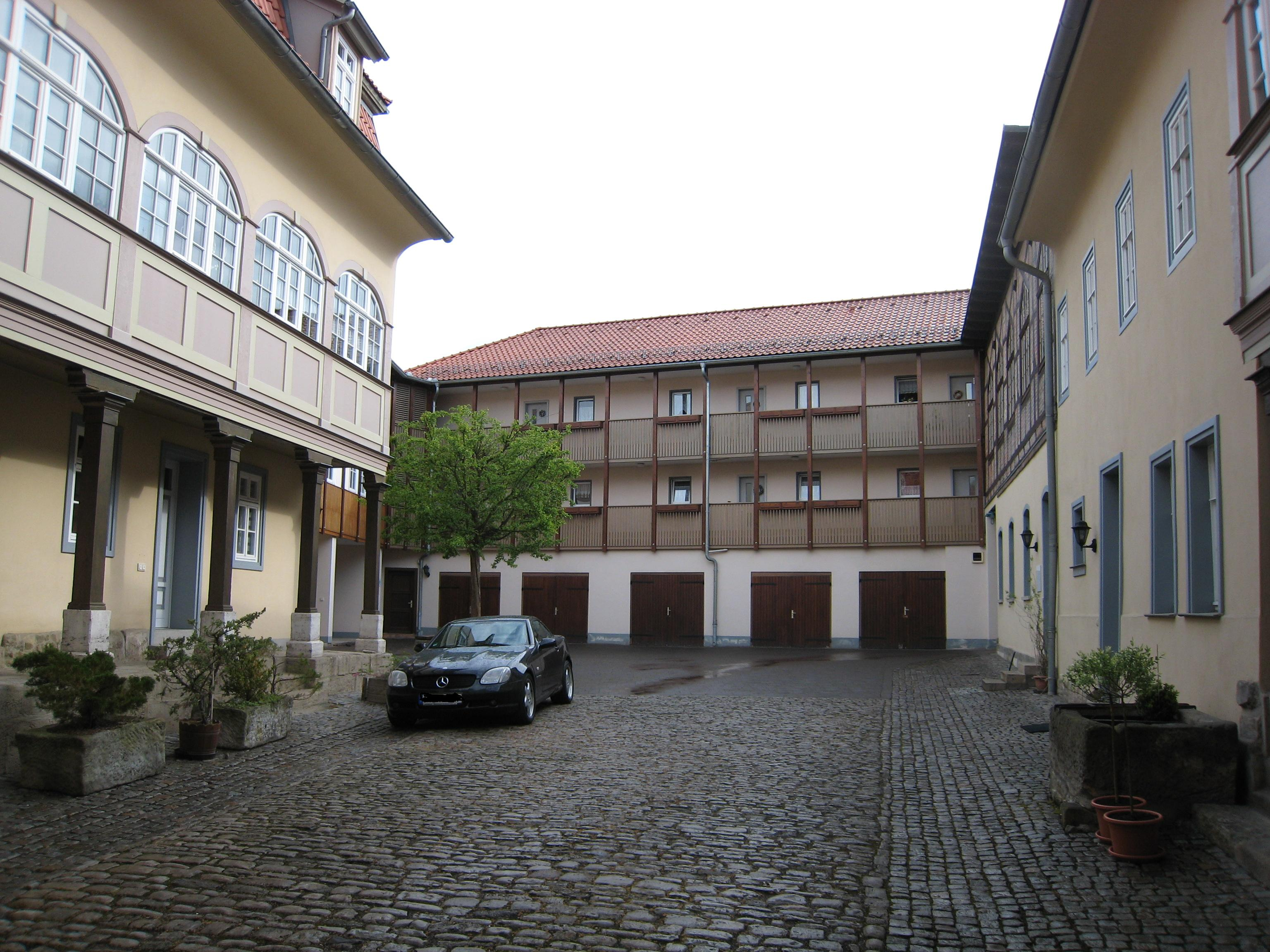 Der Mühlhof in der Längwitzer Straße 11, Arnstadt.